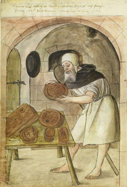 Lebküchner, Handschrift Stadtbibliothek Nürnberg Amb. 279.2°, Folio 11 verso (Landauer I), Kategorie:Bruder; Beruf(e):lebküchner (Lebküchner); Arbeitsgeräte:Brotschieber; Backofen Beschreibung: Buel steht an dem Tisch und hält einen großen Lebkuchen in Händen. Dabei hat er einen langen Brotschieber untergeklemmt. Im Hintergrund glüht der gemauerte Ofen.